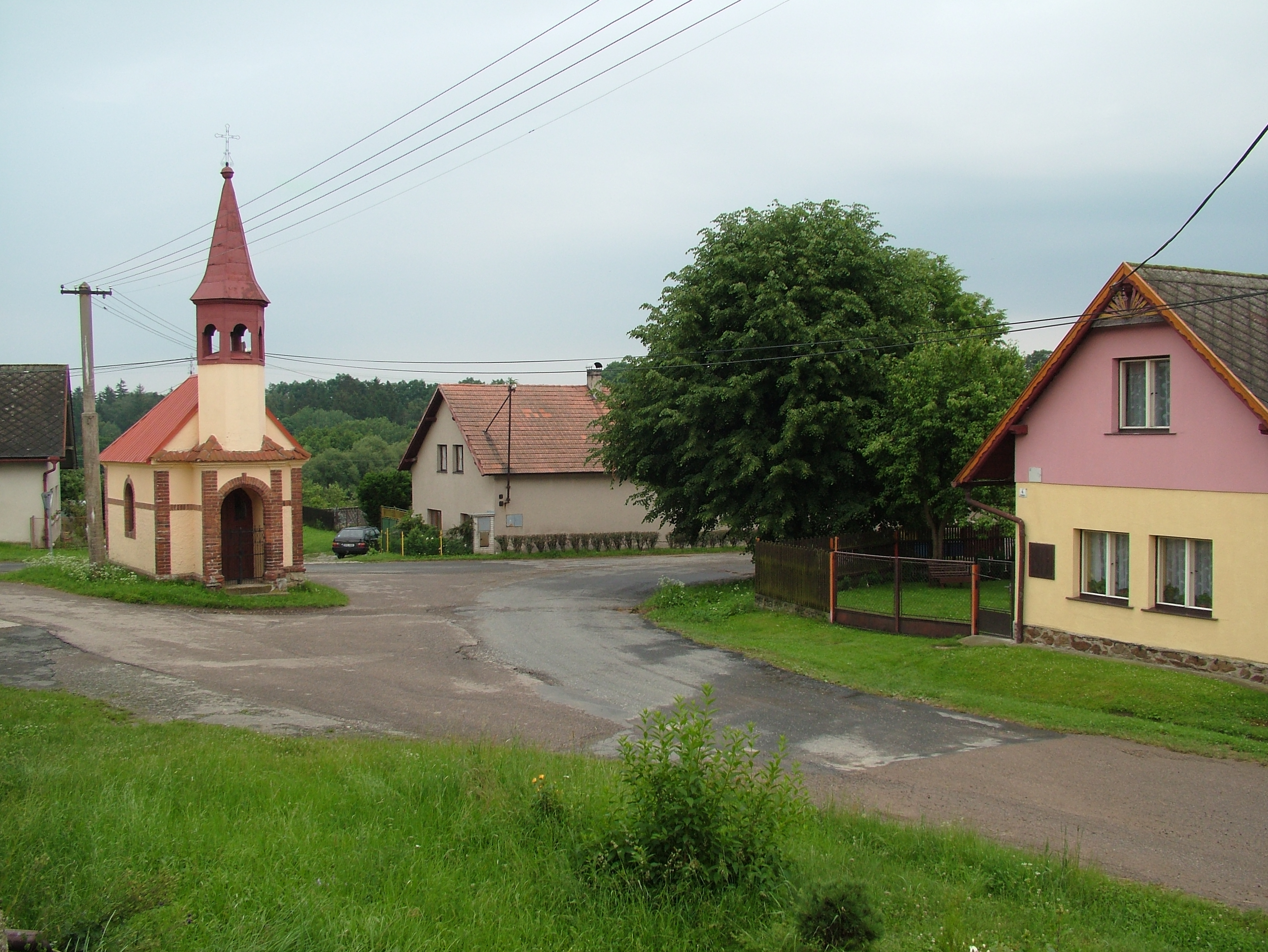 Autor fotografií: Vít Švajcr; Vít Švajcr´s photographs